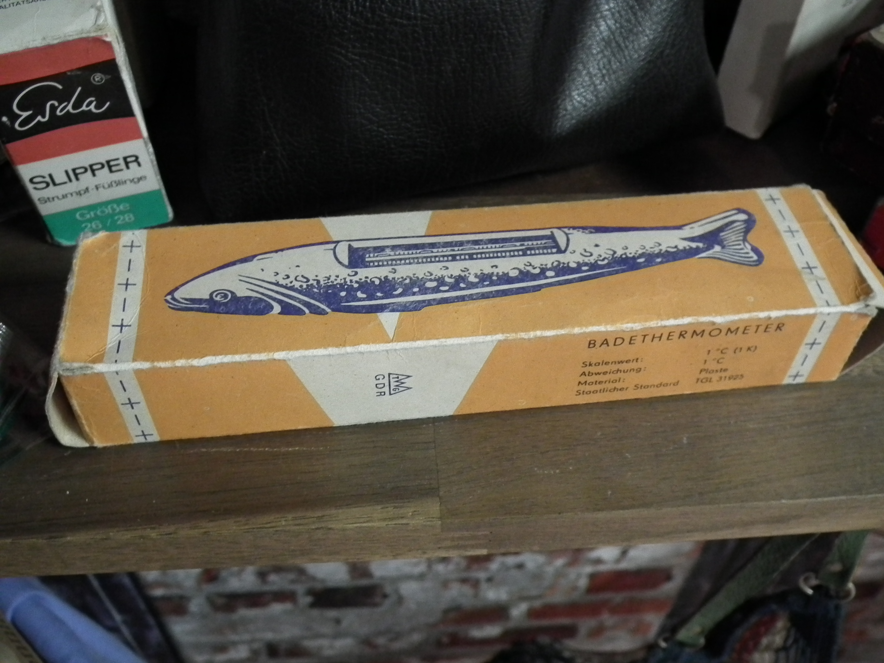 N’Ostalgiemuseum Leipzig